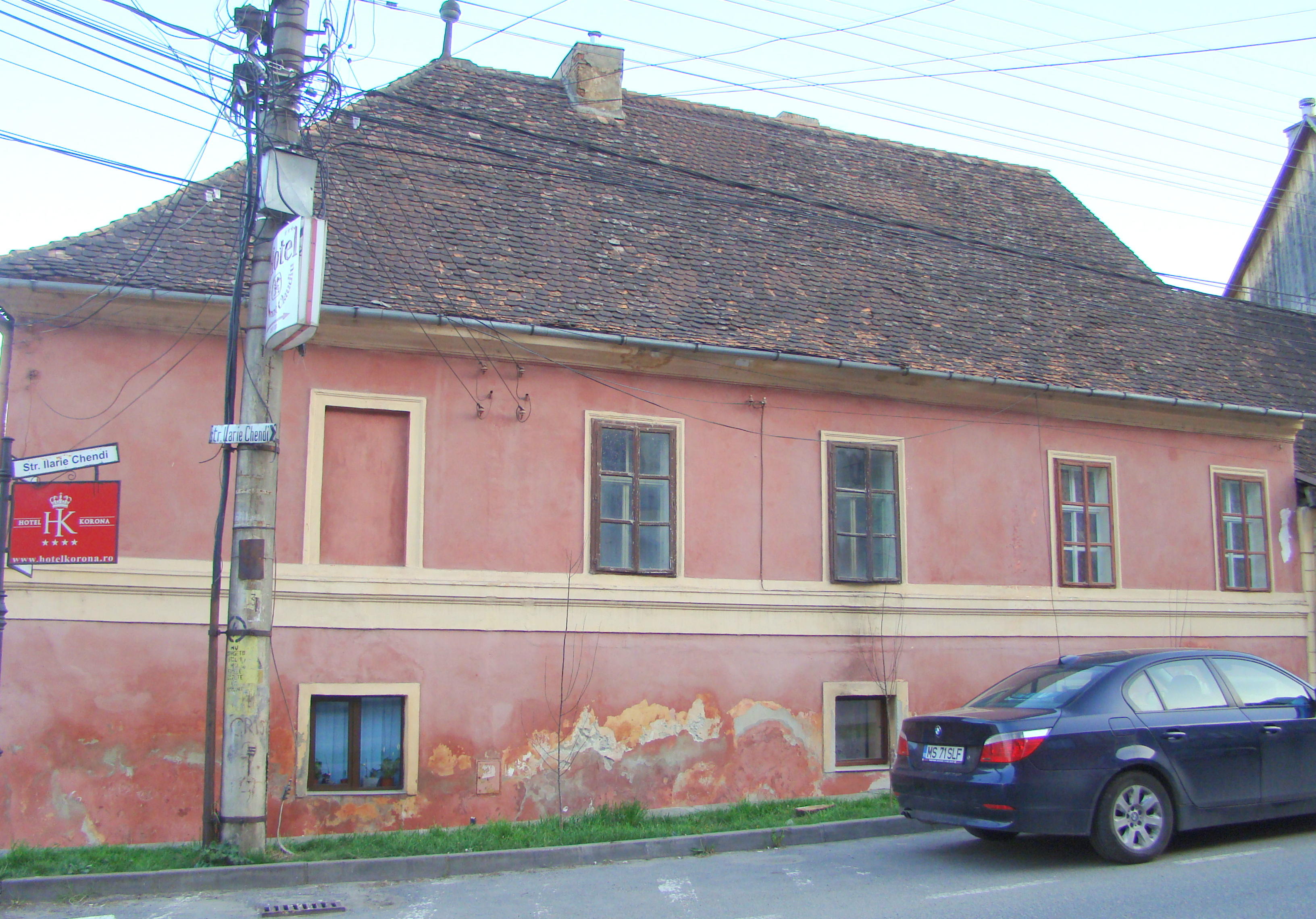 Casă, municipiul Sighișoara, str. Chendi Ilarie 1 1750